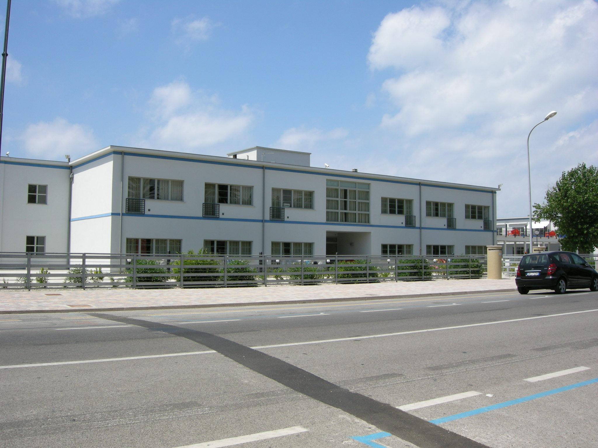 Ex colonia dei Fasci Italiani all'Estero